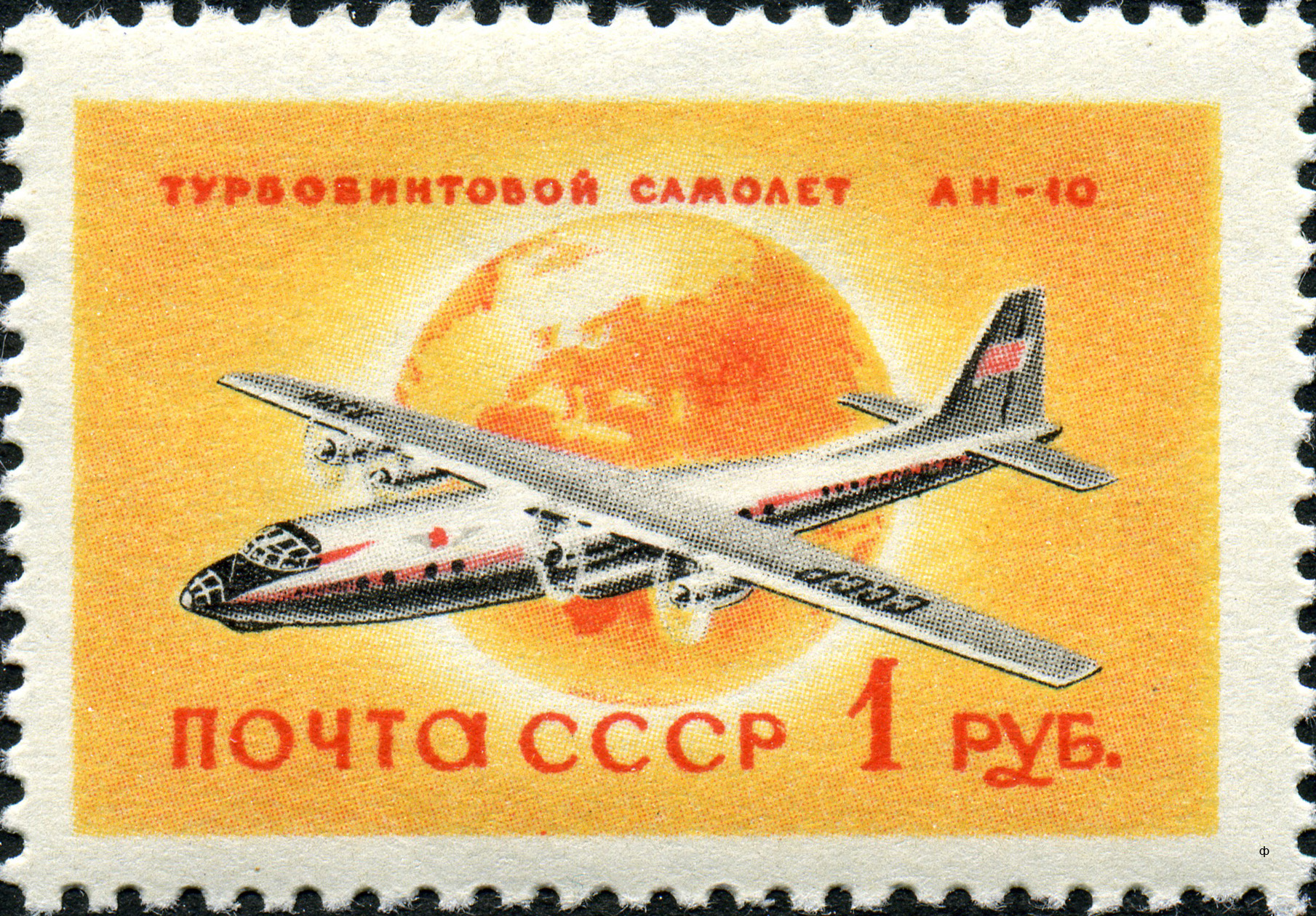 Марка СССР